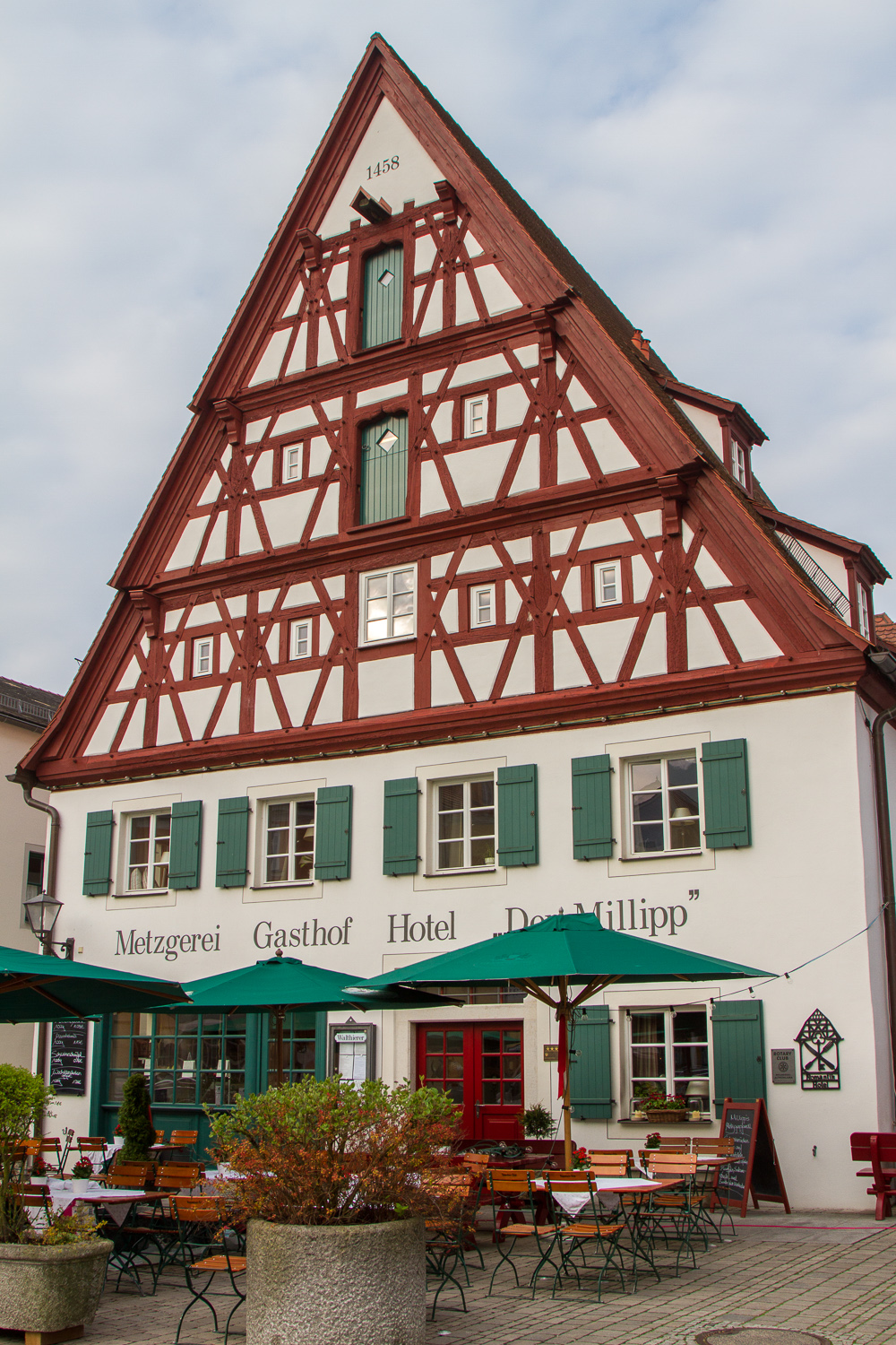 Gasthof Walthierer; Hausname: "Der Millipp", zweigeschossiger Steildachbau, modern bezeichnet mit dem Jahr 1797 (nicht sichtbar), reicher dreigeschossiger Fachwerkgiebel, 16./17. Jahrhundert, modern bezeichnet mit dem Jahr 1458.This is a photograph of an architectural monument.